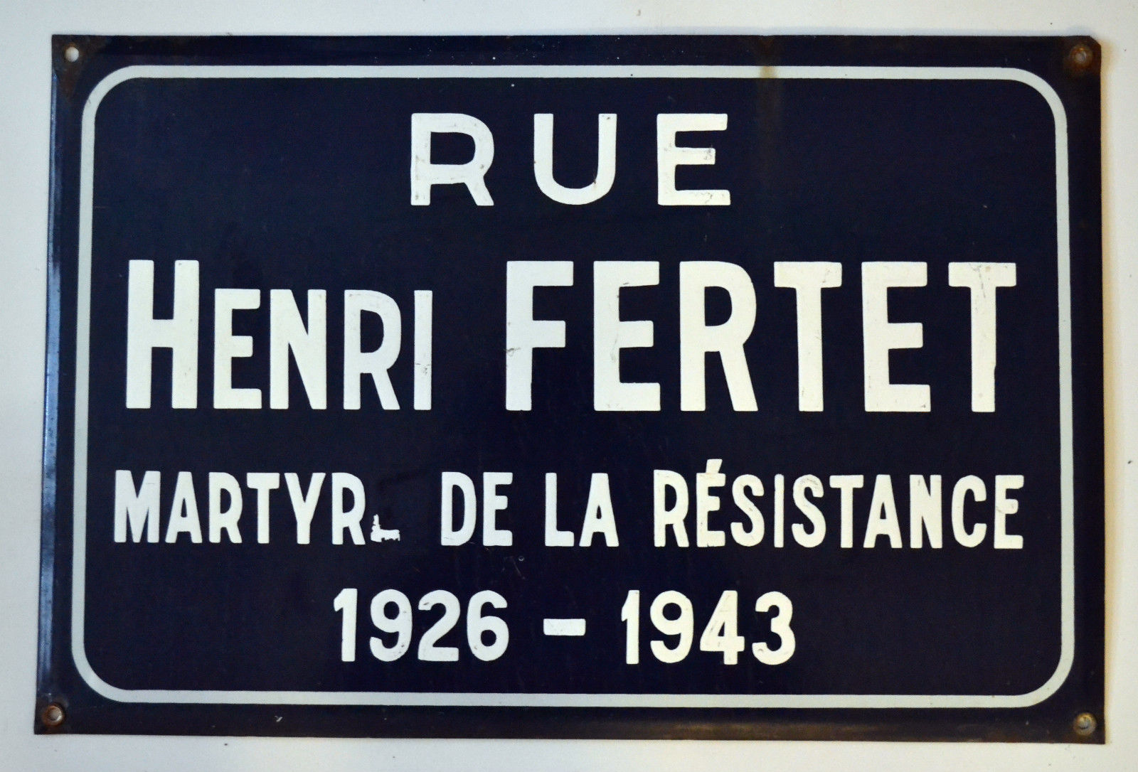 Plaque de rue, quartier de Velotte Besançon